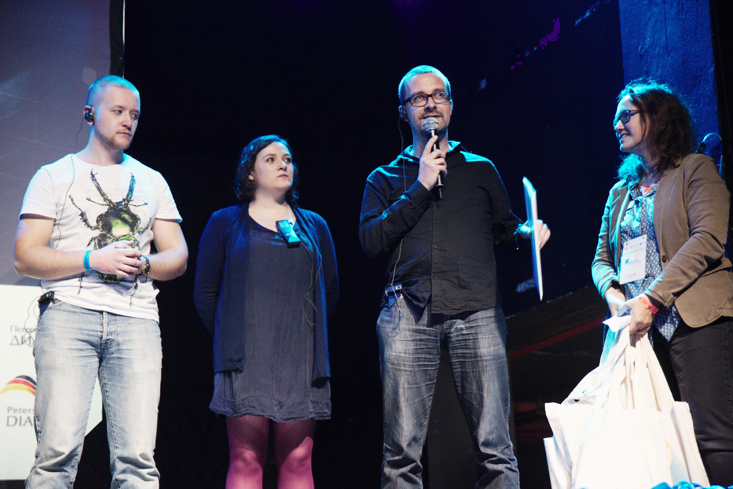 Российско-германский Science Slam, Петербург, клуб А2. Грегор Бьюнинг вручает награду победительнице Сюзан Груб